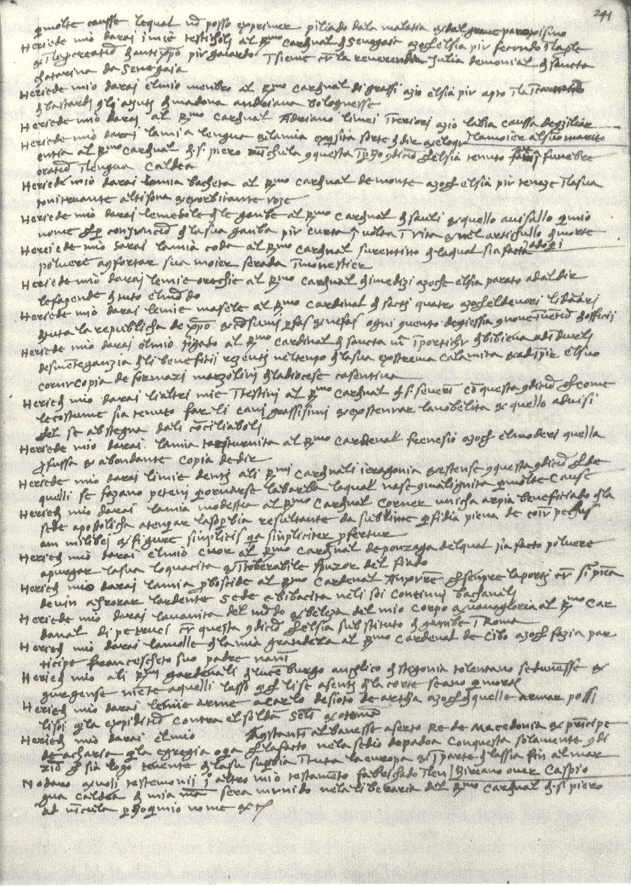 Das Testament des Elefanten (Manuskript-Kopie)